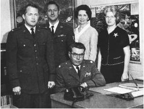 Mitarbeiter von Project Blue Book, 1963. In der Mitte sitzend der damalige Leiter Major Hector Quintanilla.